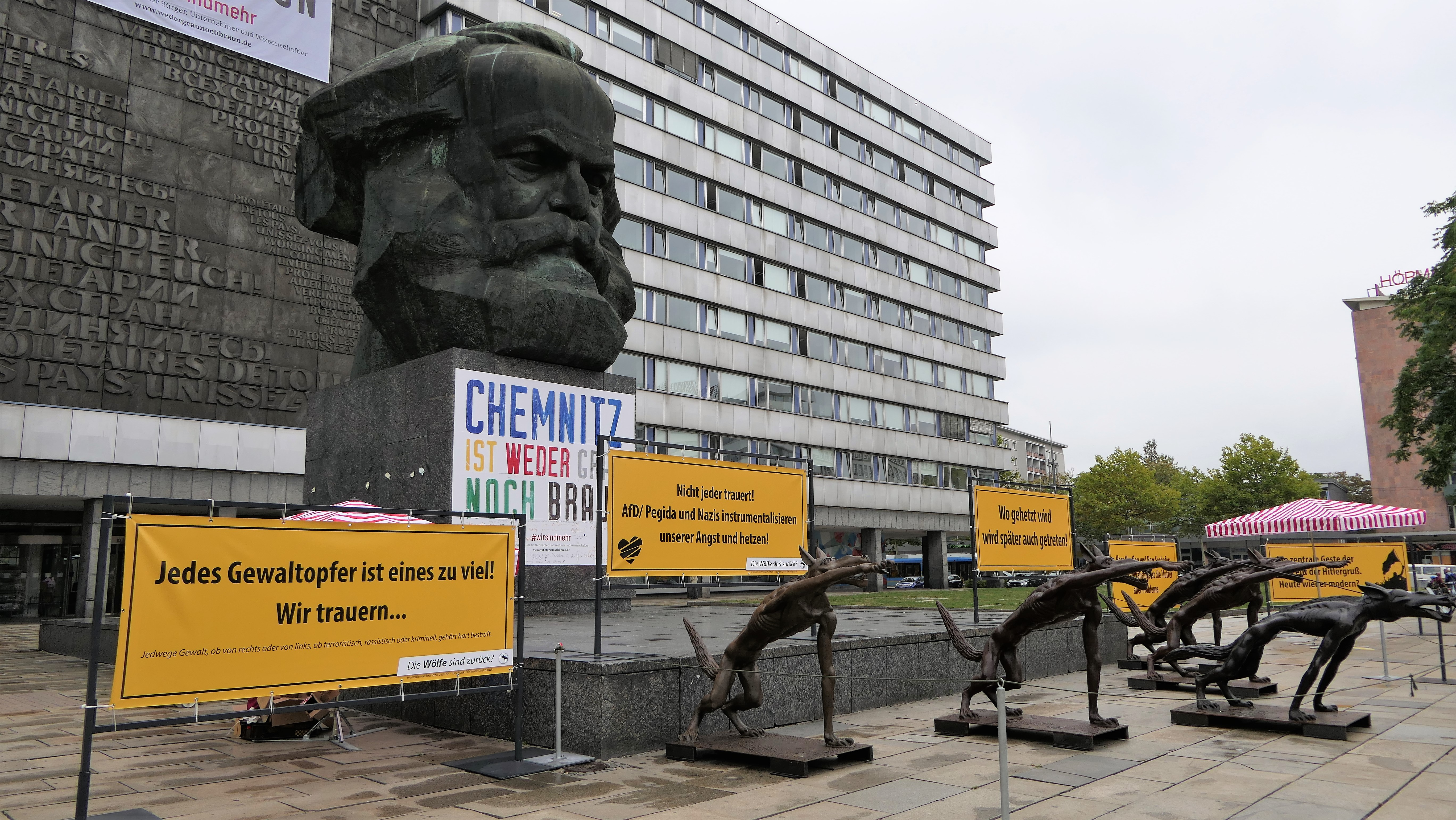 Kunstaktion mit Wölfe-Bronzeplastiken des Brandenburger Künstlers Rainer Opolka am Karl-Marx-Denkmal in Chemnitz gegen Hetze und Gewalt, am 13. September 2018. Einige der Tierplastiken zeigten den Hitlergruß, andere stellten Mitläufer dar.